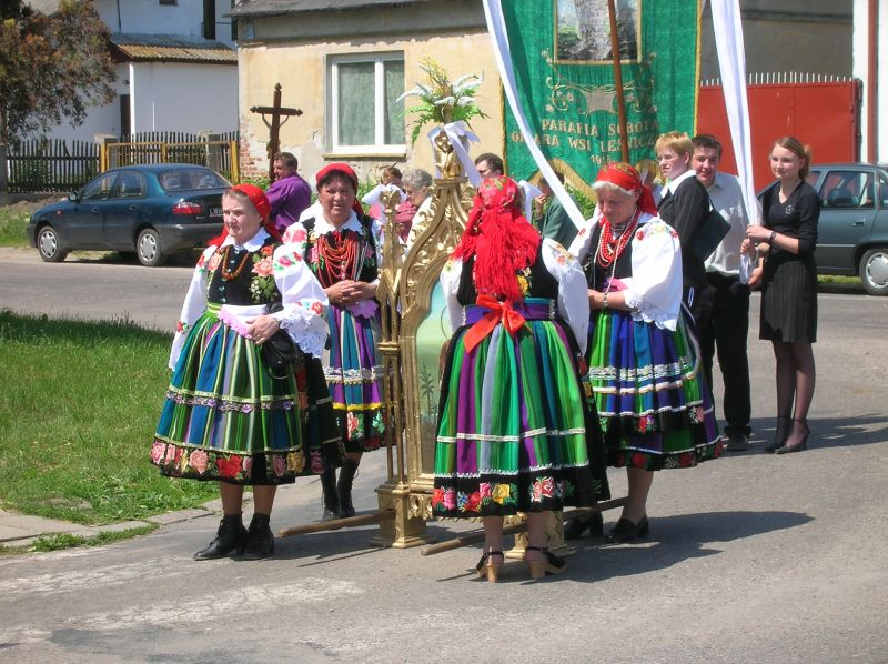 Boże Ciało, wieś Sobota